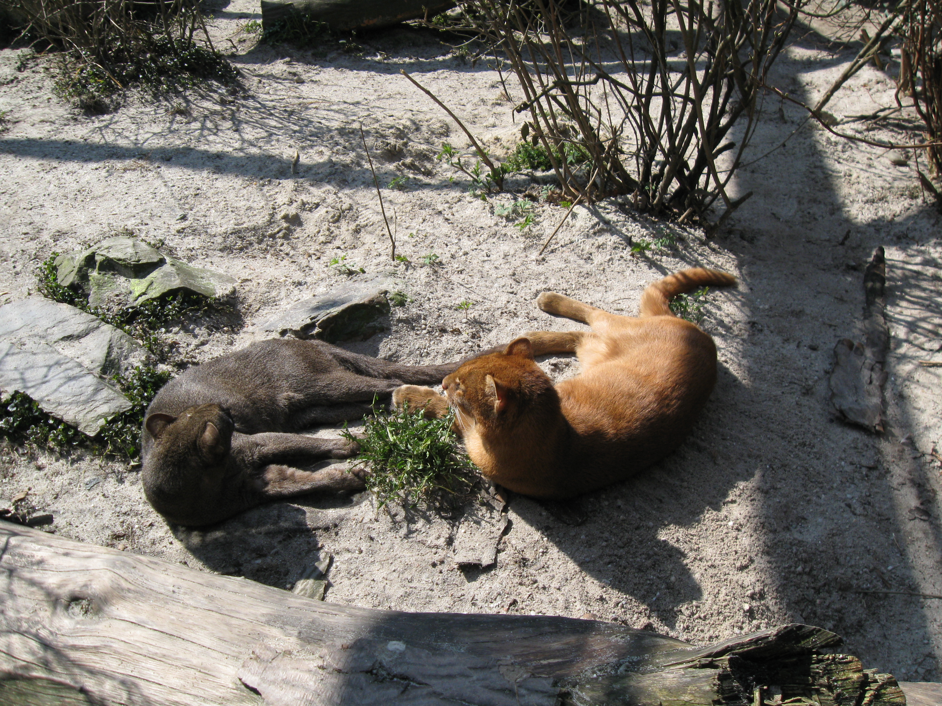 Jaguarundi v ostravské zoo.